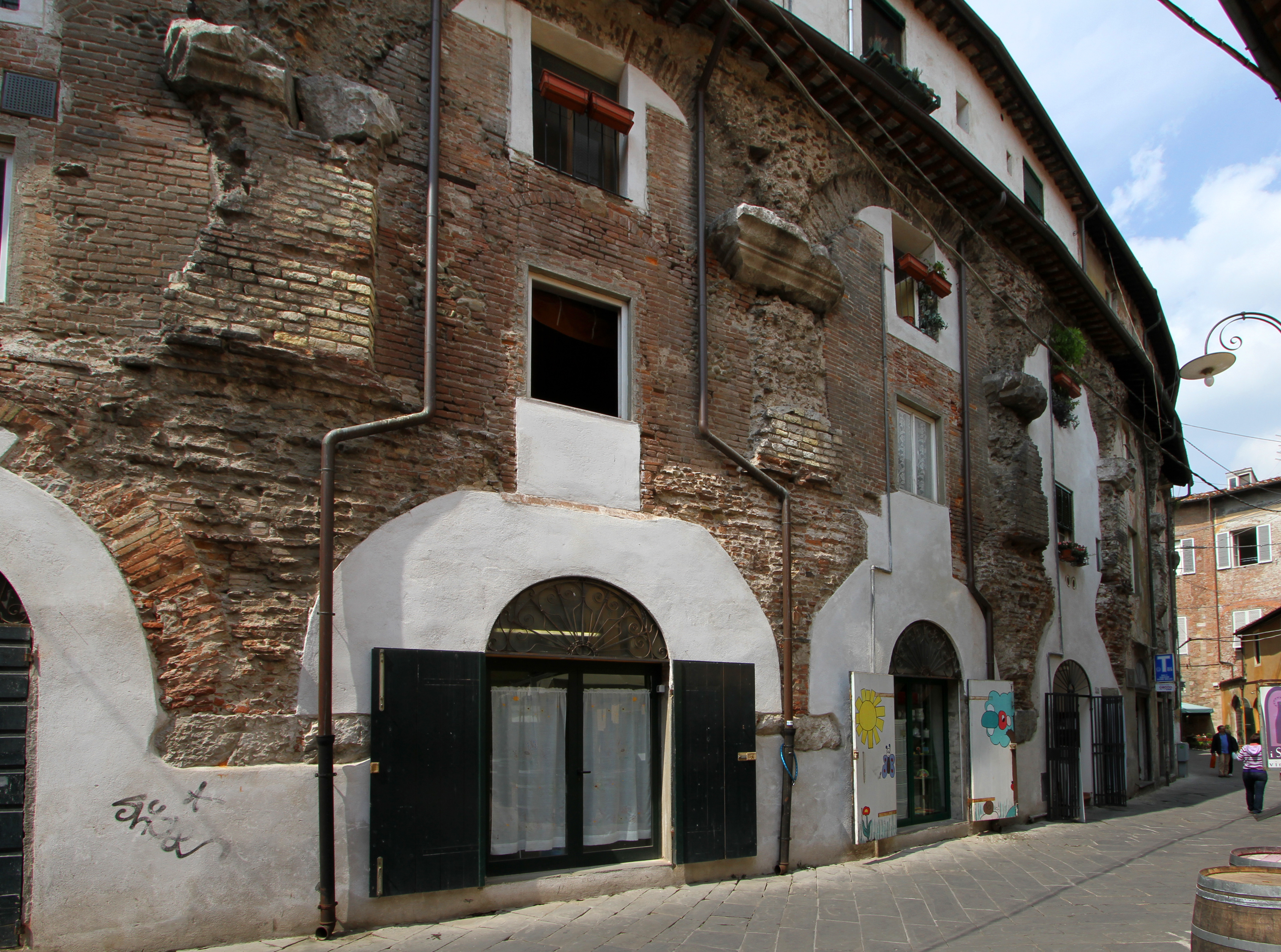 Resti dell'Anfiteatro Romano